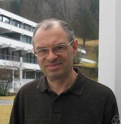 Foto di Victor Ginzburg